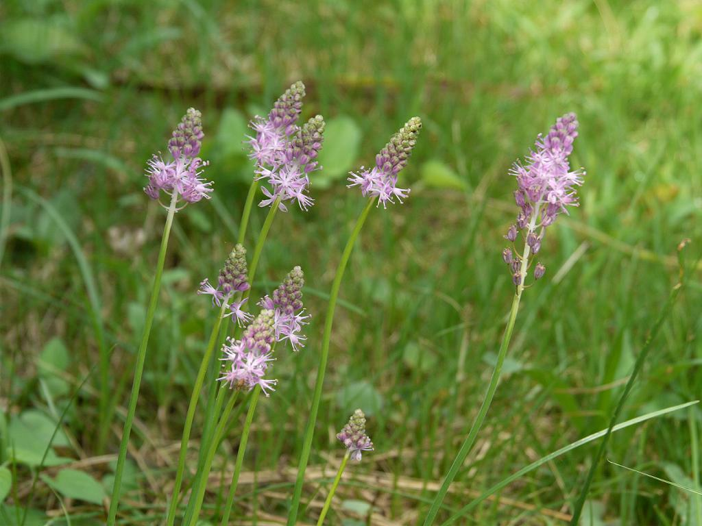 Scilla scilloides：ツルボ 2008/09/14 和歌山県田辺市：Tanabe City. Wakayama Pref. Japan